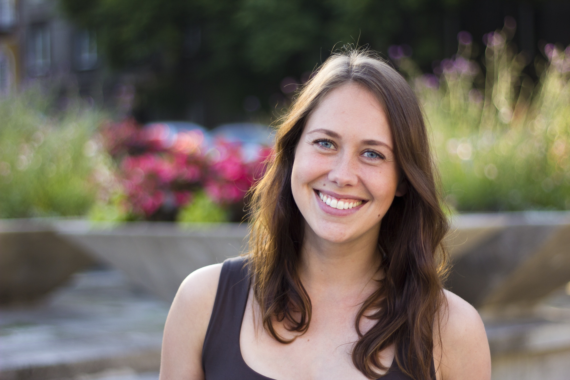 Eesti ettevõtja Ülane Vilumets